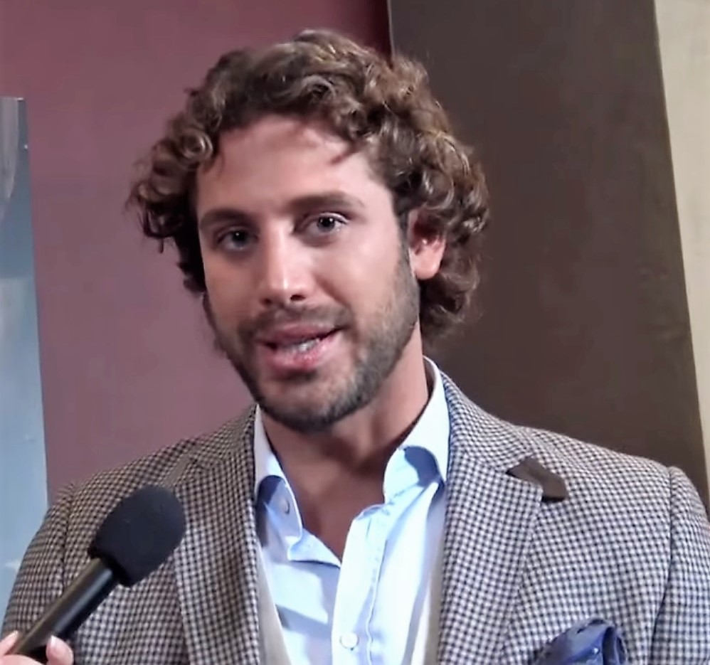 !Que Divertidos! 🍭 mira como bailan y cantan Lambda García y Ana Belena de "sangre de mi tierra" Te presentamos a Ana Belena y Lambda García de la nueva producción original de Telemundo “Sangre de mi Tierra” que estrenará el miércoles 29 de noviembre a las 9pm/8c by Dulce Osuna